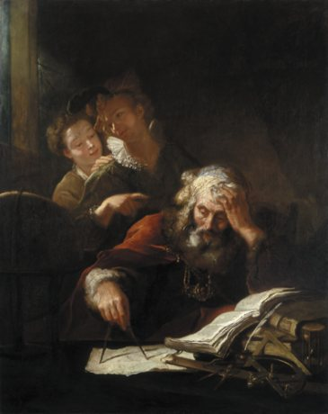 Pendant of Gypsy fortuneteller.